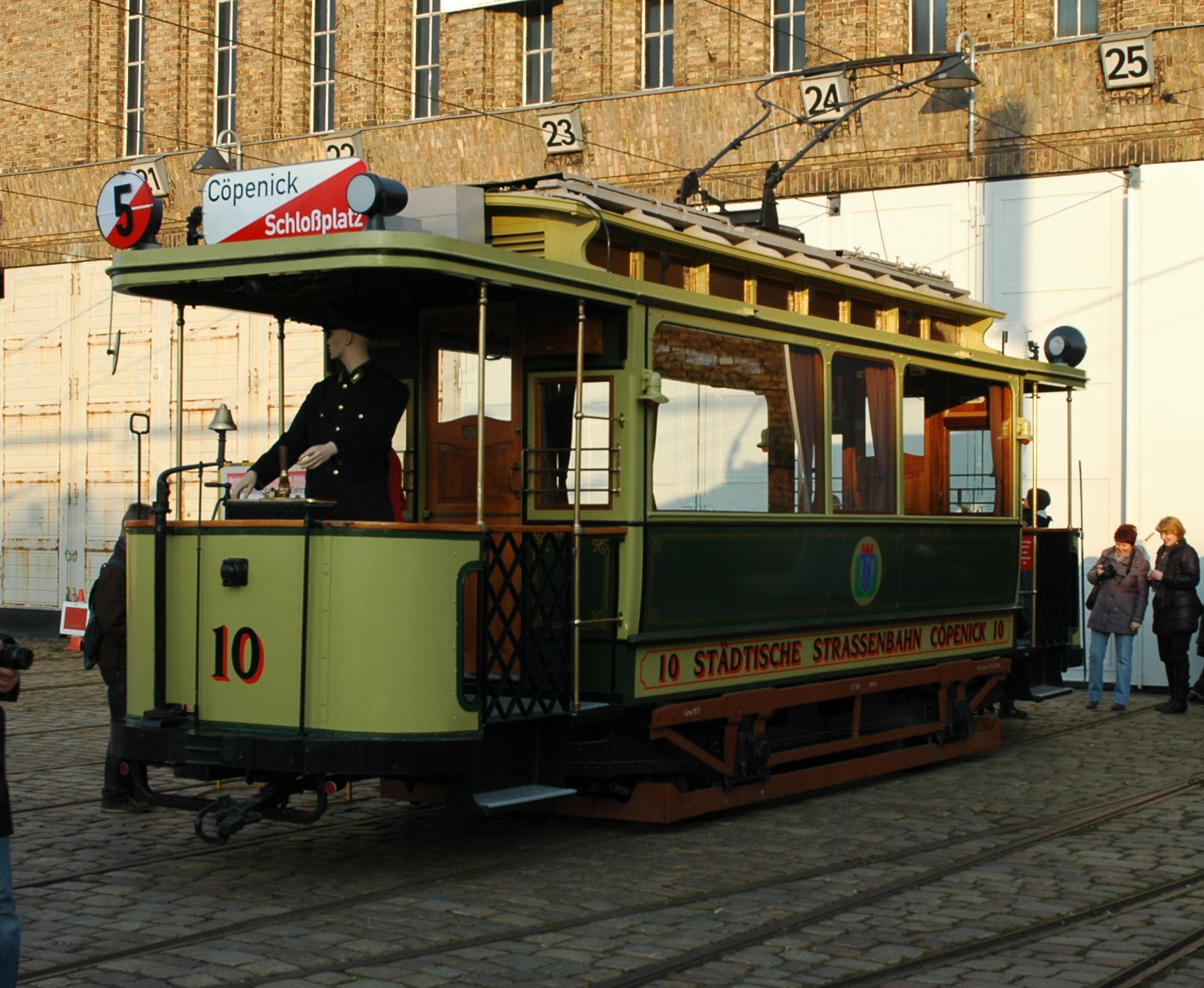 Triebwagen 10 der Städtischen Straßenbahn Cöpenick im Straßenbahnbetriebshof Niederschönhausen